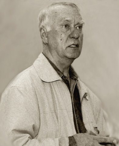 Михаил Николаевич Кураев